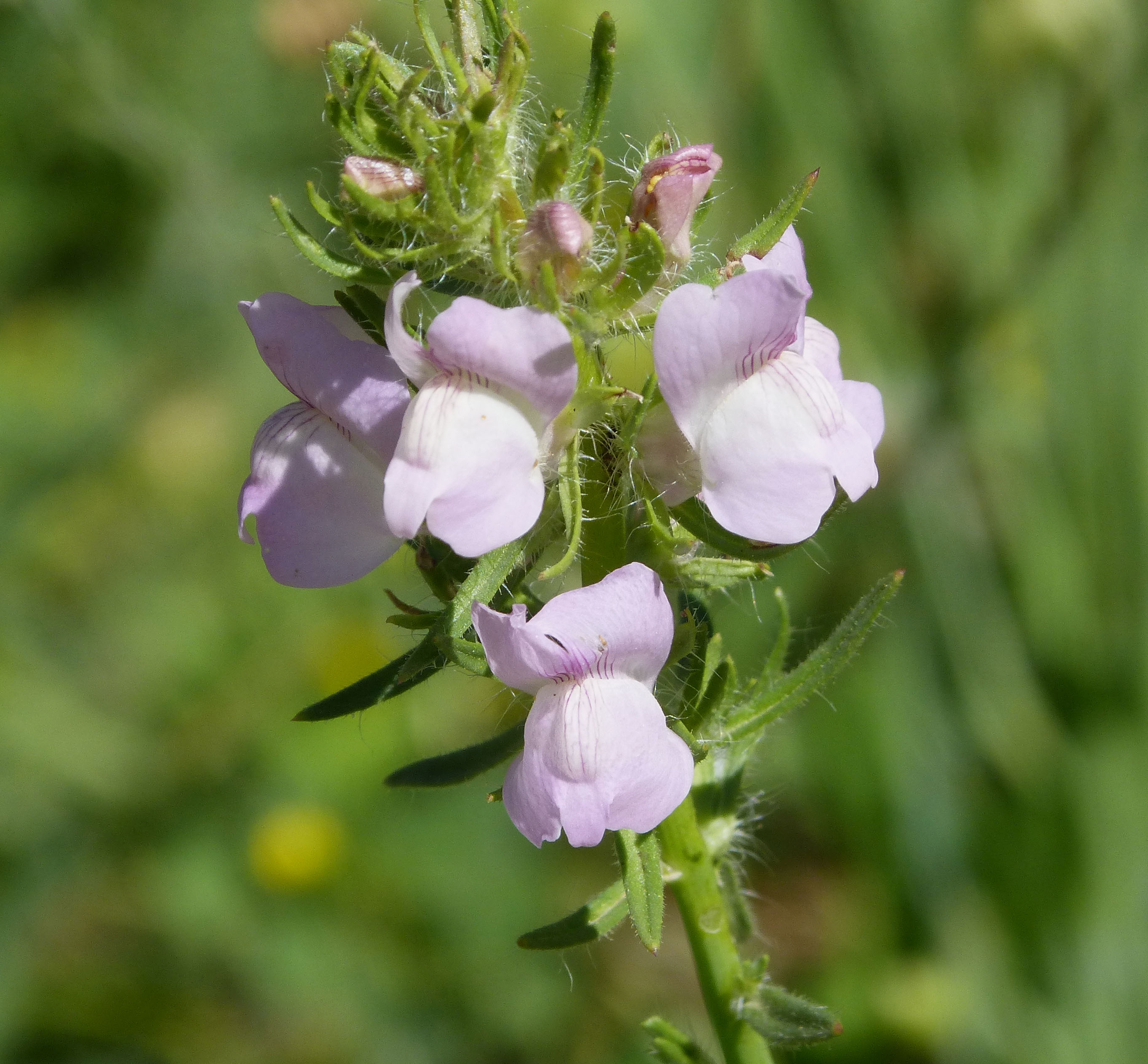 Alcornocales N.P. Andalucia, Spain